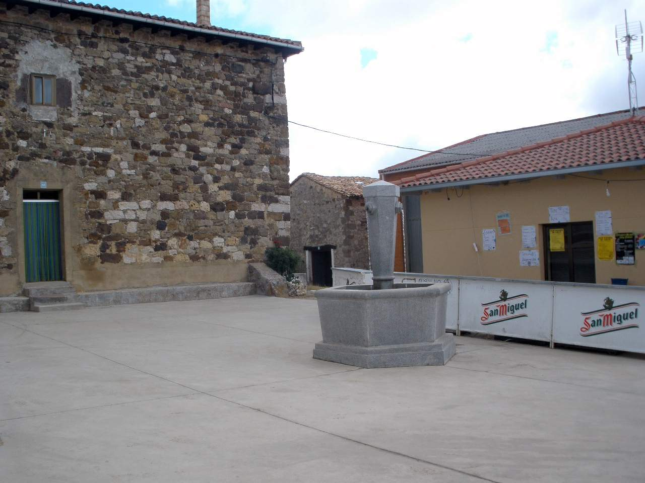 San Mamés de Abar (Burgos)